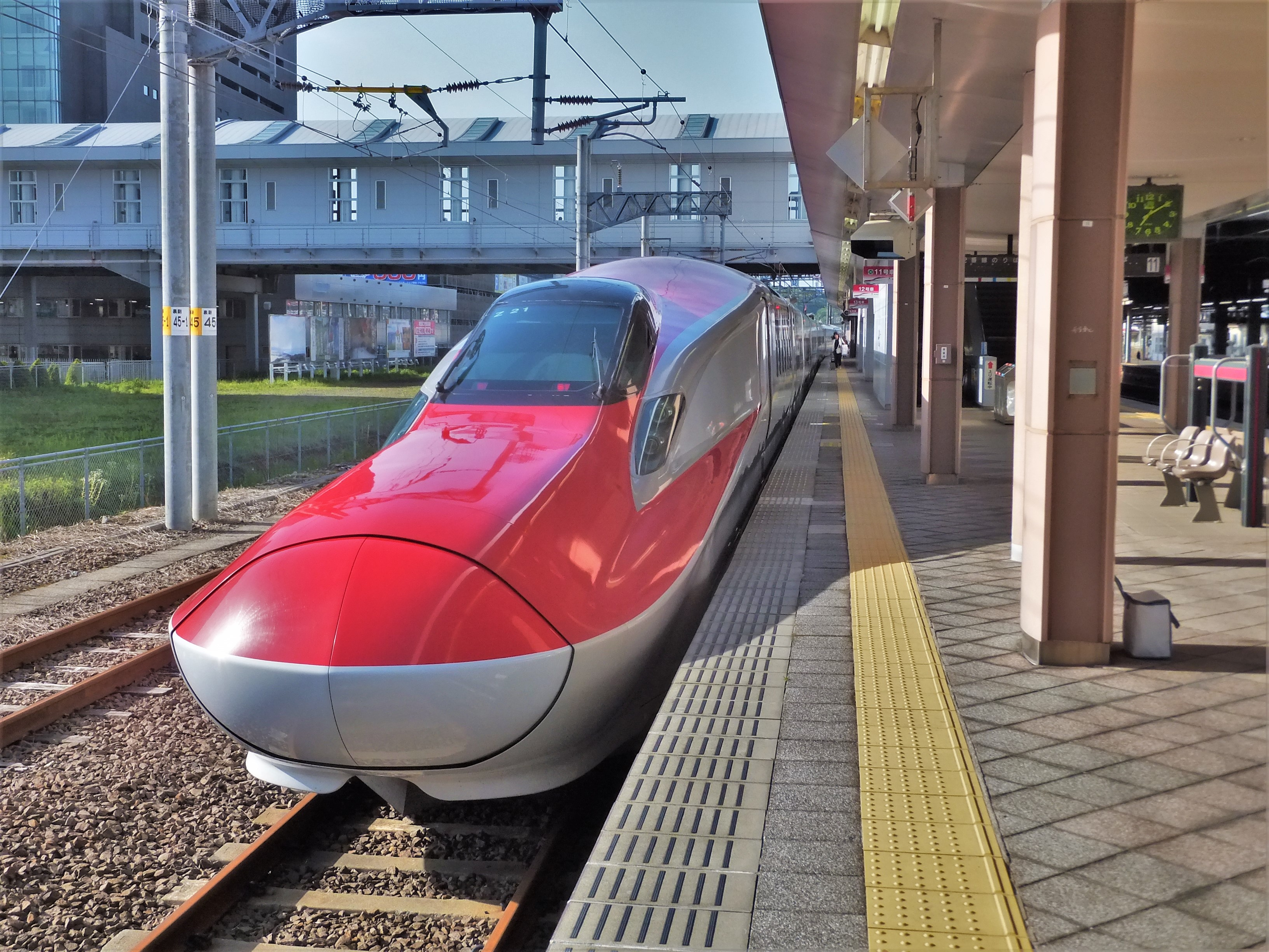 秋田駅で発車を待つ「こまち」号（2015年5月6日）